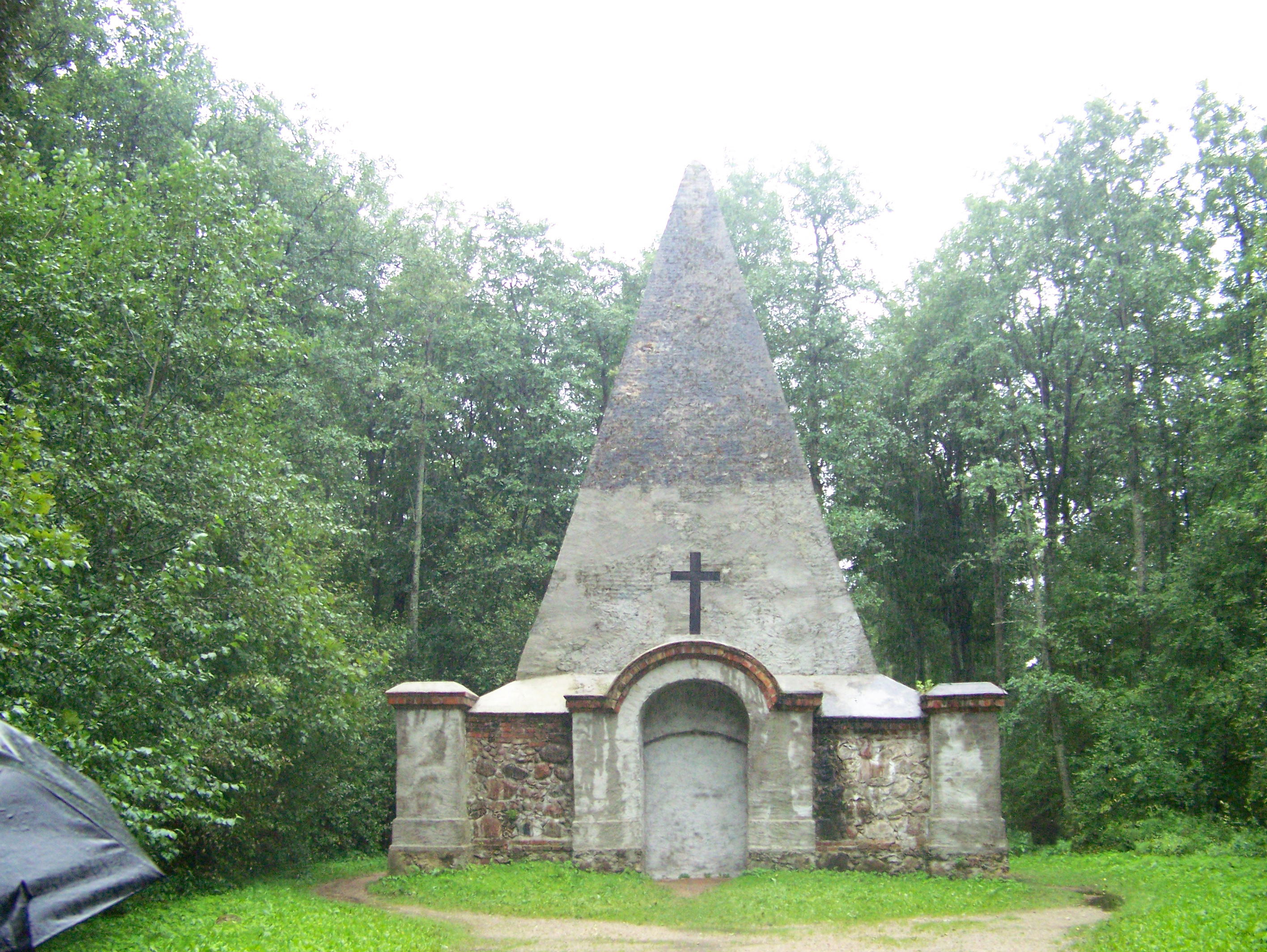 Piramida w Rapie